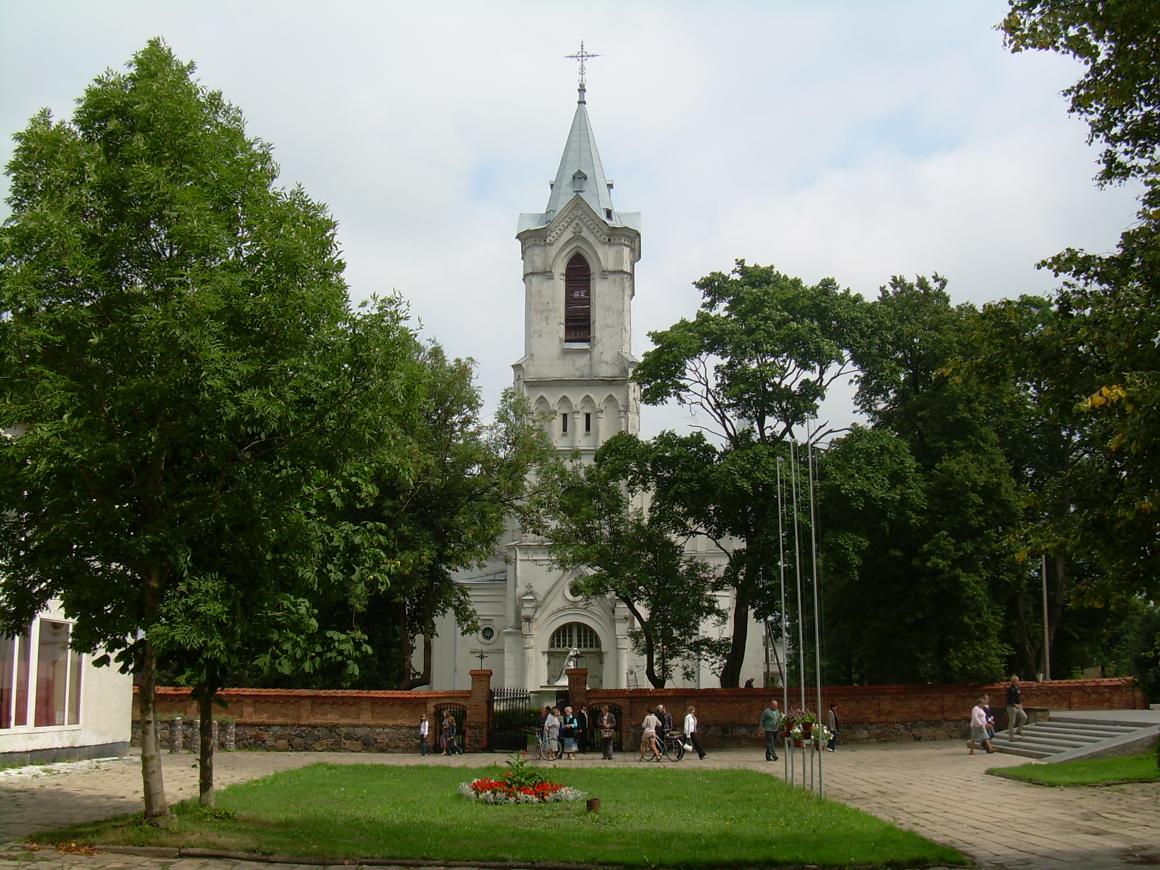 Baisogalos Švč. Trejybės bažnyčia